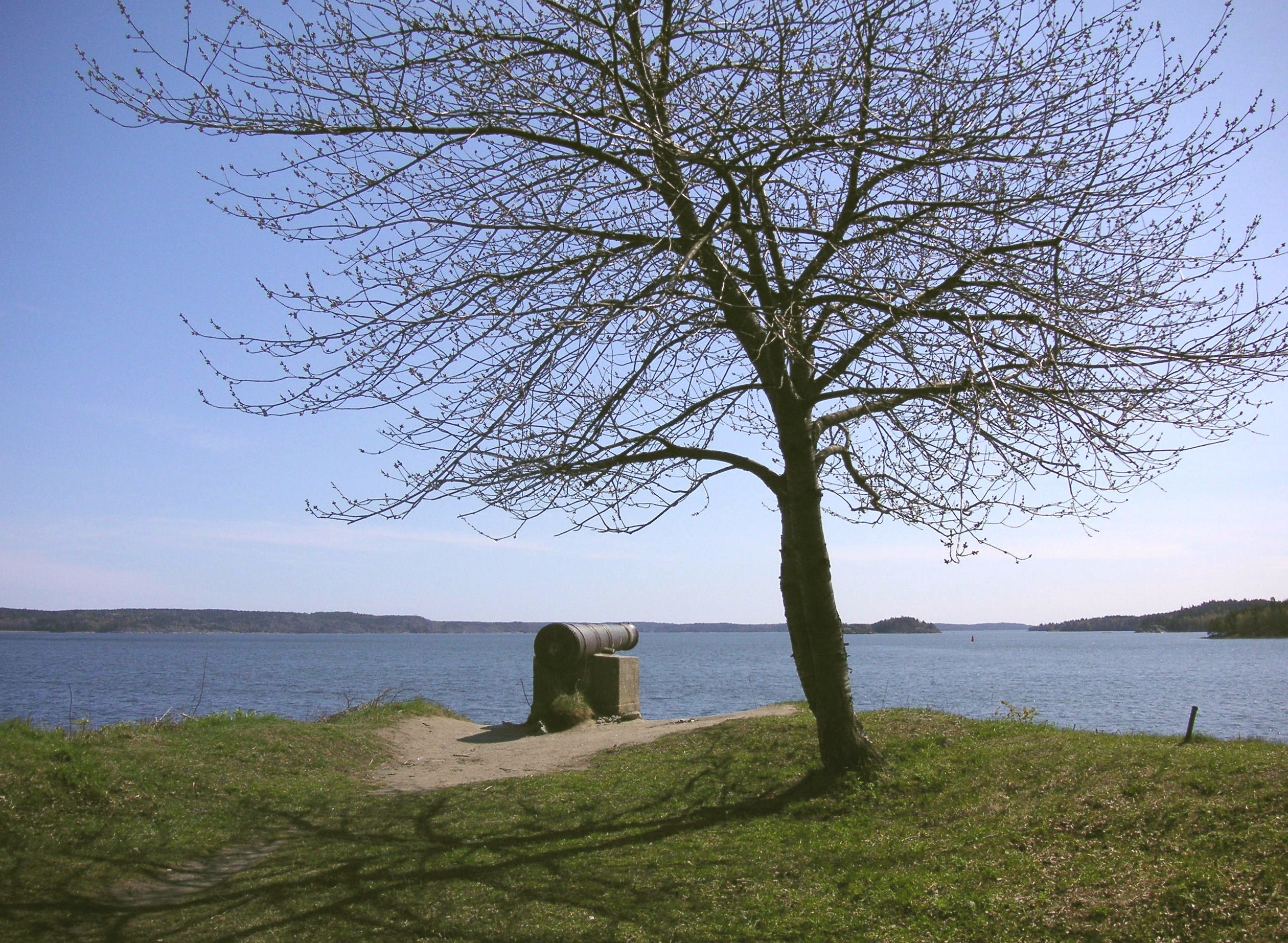 Nässkansen i Botkyrka kommun